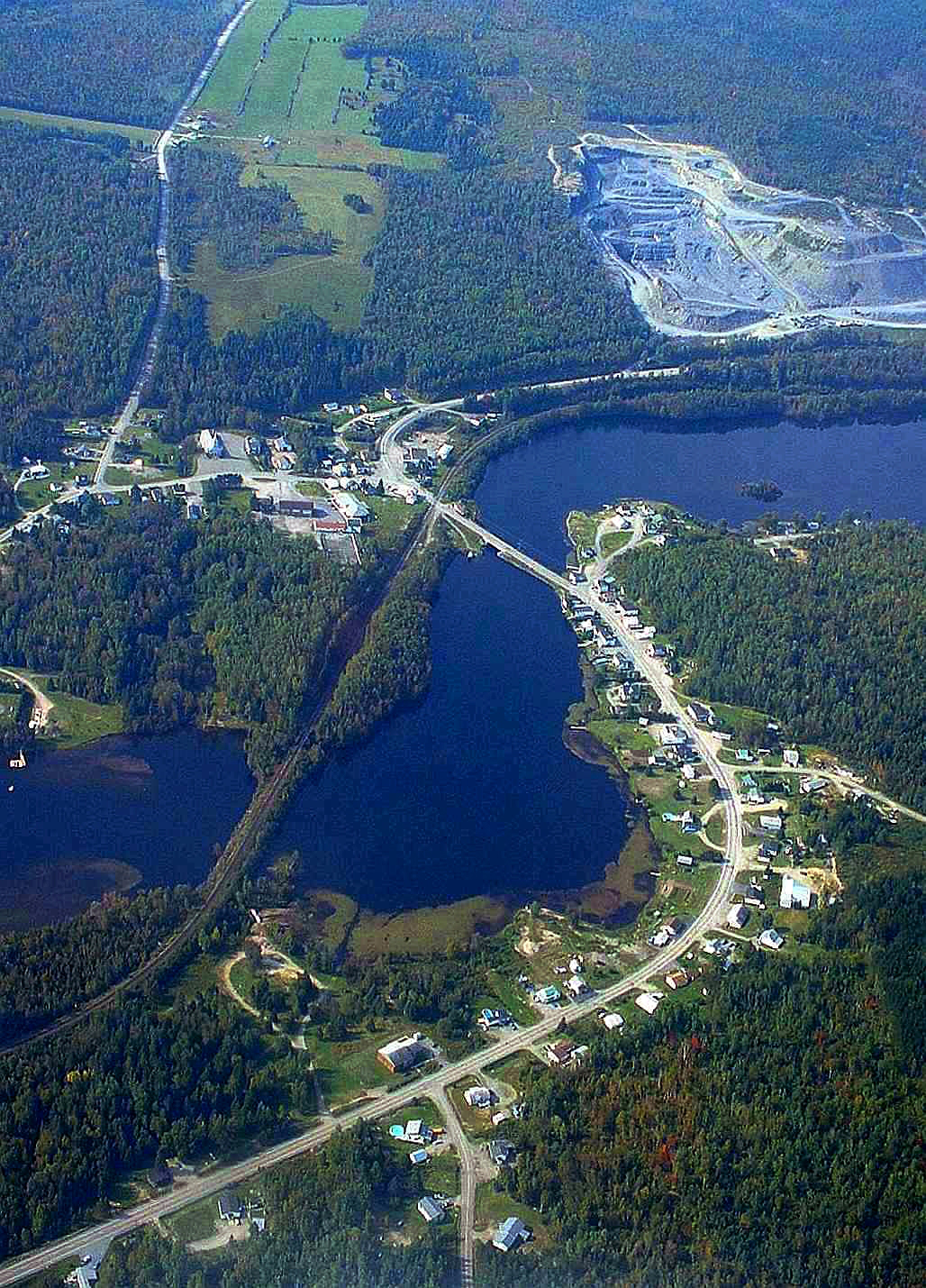 Vue aérienne du village de Saint-Marc-du-Lac-Long, au Témiscouata (Québec), avec en arrière-plan, la carrière d'ardoise de Glendyne, principal employeur de la municipalité